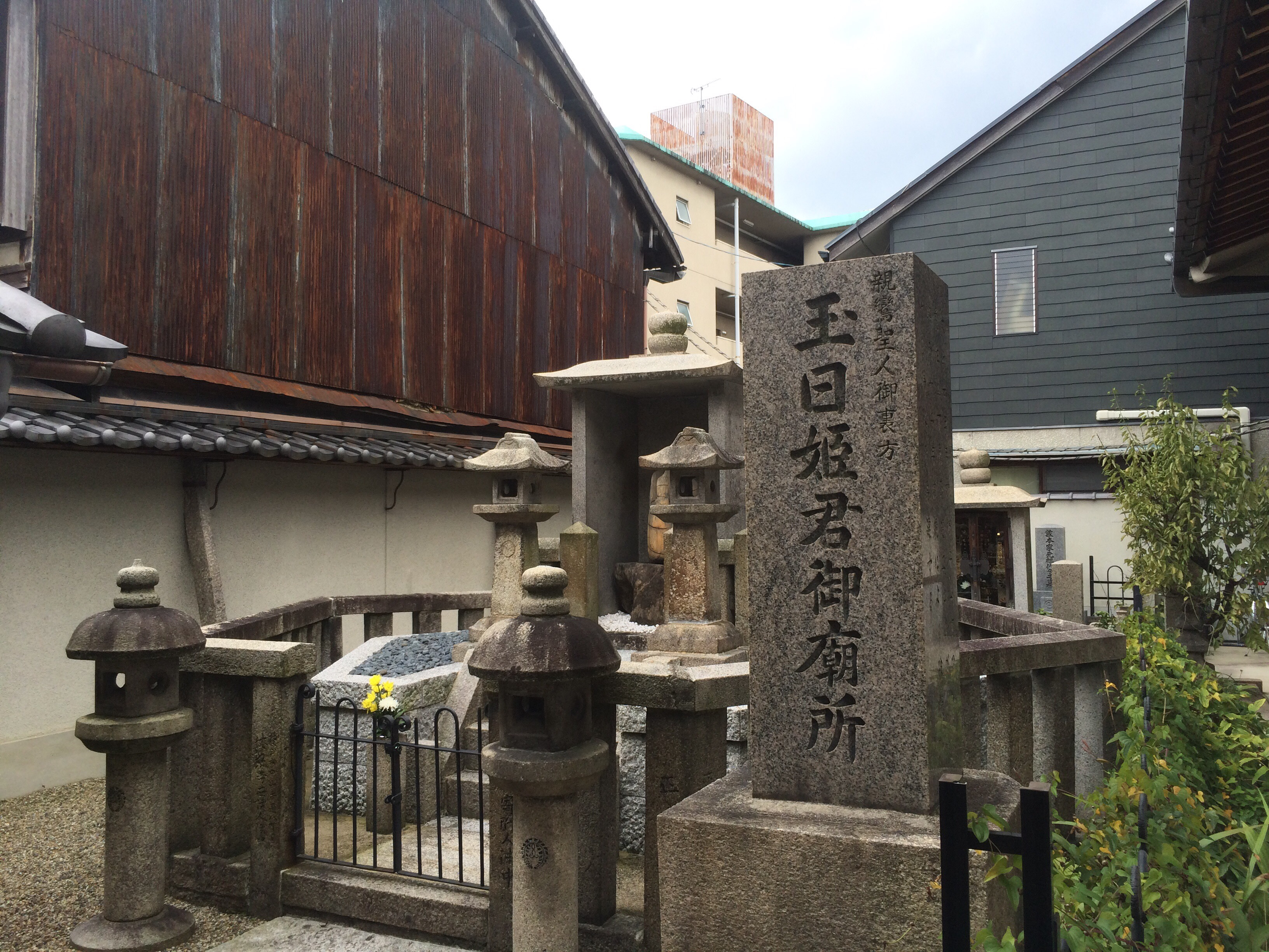 玉日姫御廟所、西岸寺、京都藤森